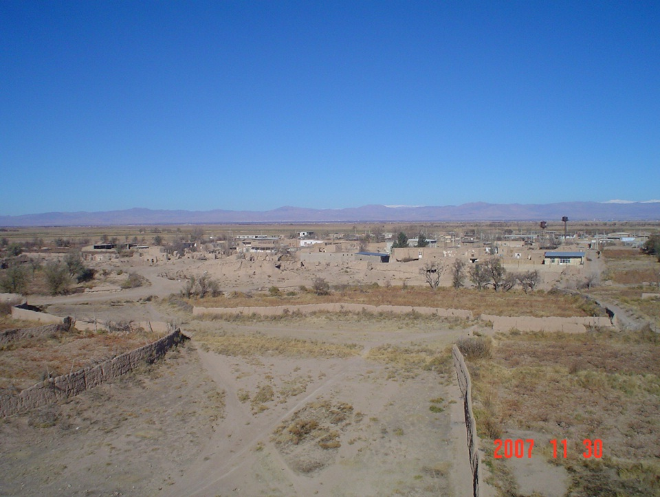 aghababa.tk